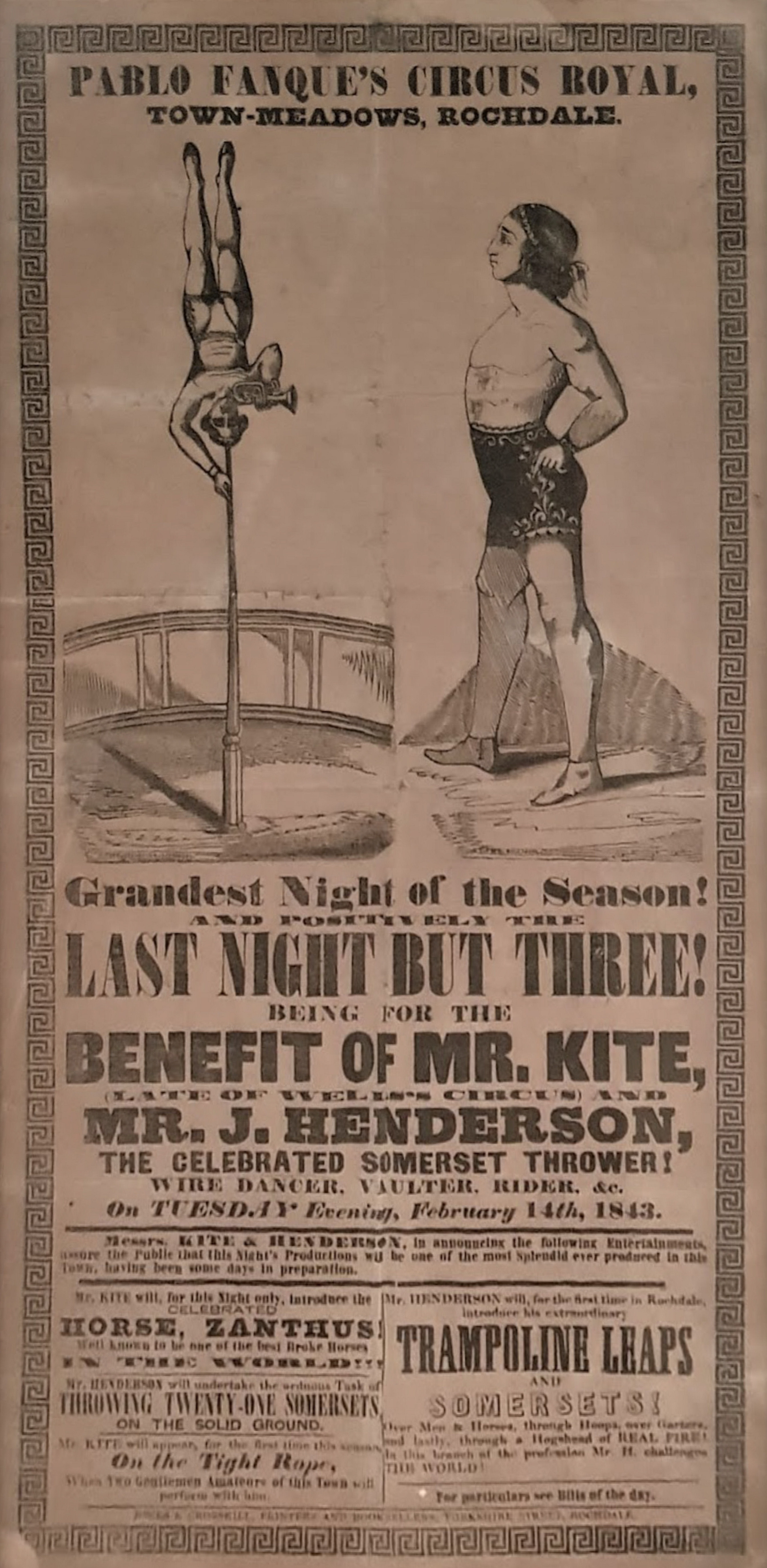 Plakat für Pablo Fanques Zirkus, das die Inspiration für das Beatles-Lied Being for the Benefit of Mr. Kite! war. Es handelt sich um das Originalplakat aus John Lennons Besitz, das 2018 ein Exponat der Ausstellung Double Fantasy – John and Yoko im Museum of Liverpool war.